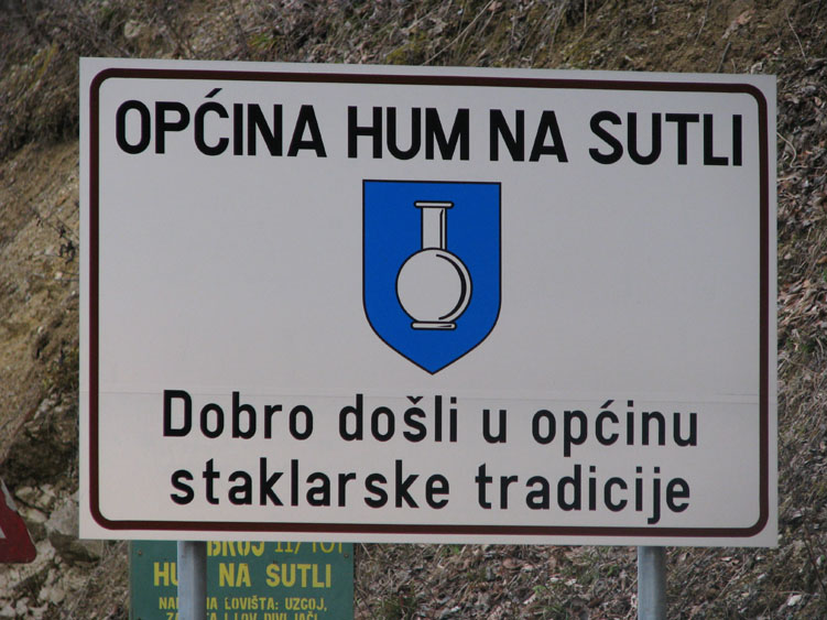 Ploča na ulazu u općinu Hum na Sutli